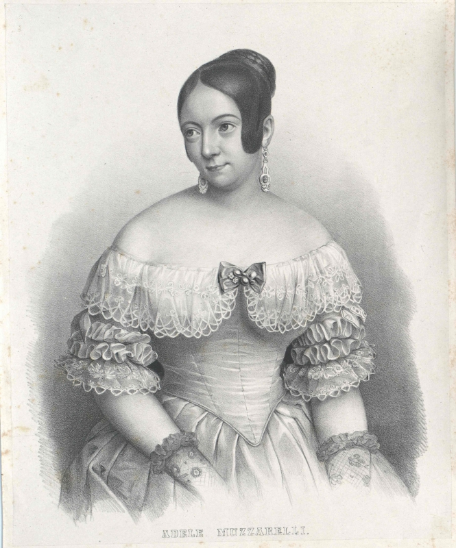 Adele Muzzarelli in Bekmann, soprano